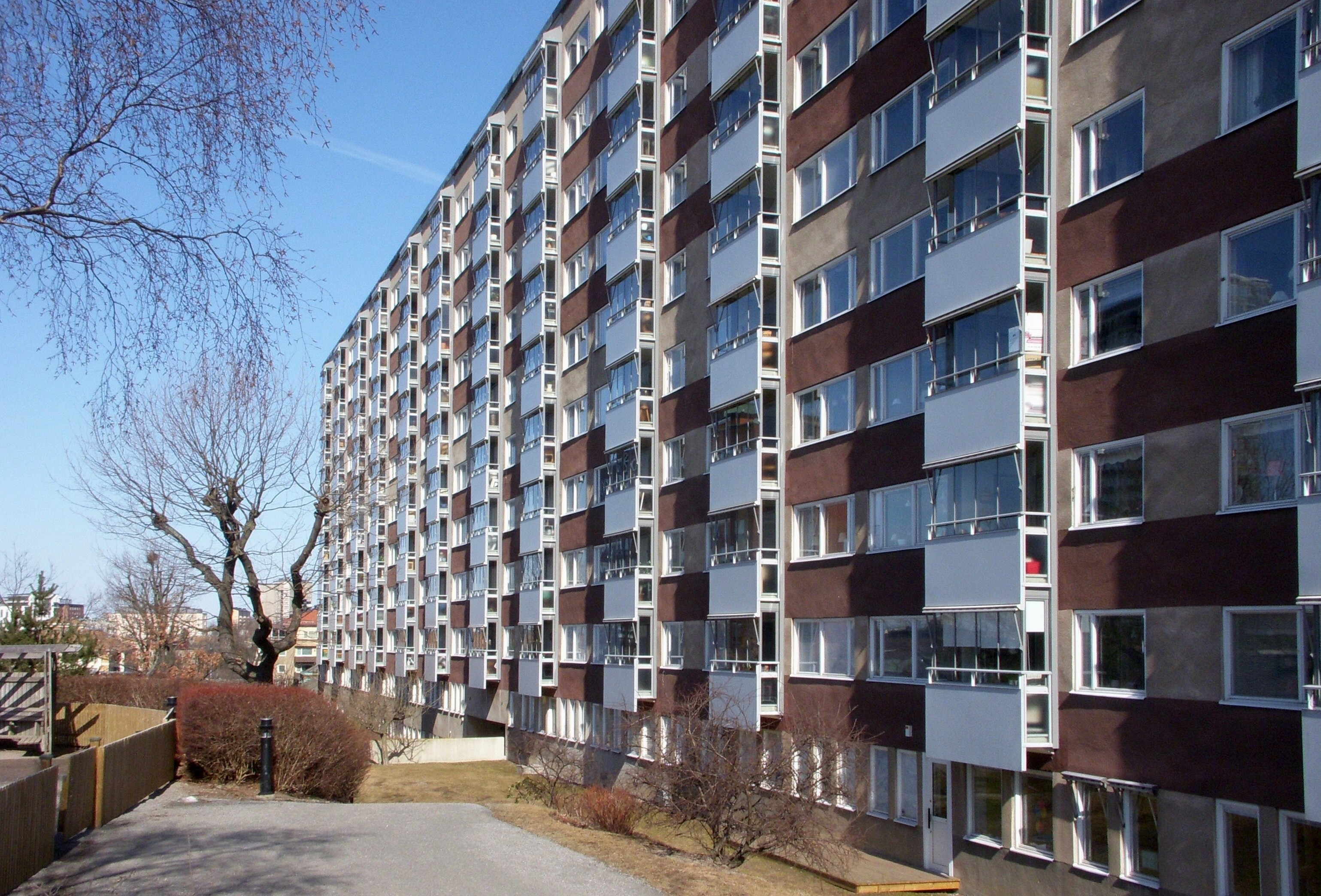 Det så kallade "Bacon hill"-huset på Marieberg, Kungsholmen, Stockholm